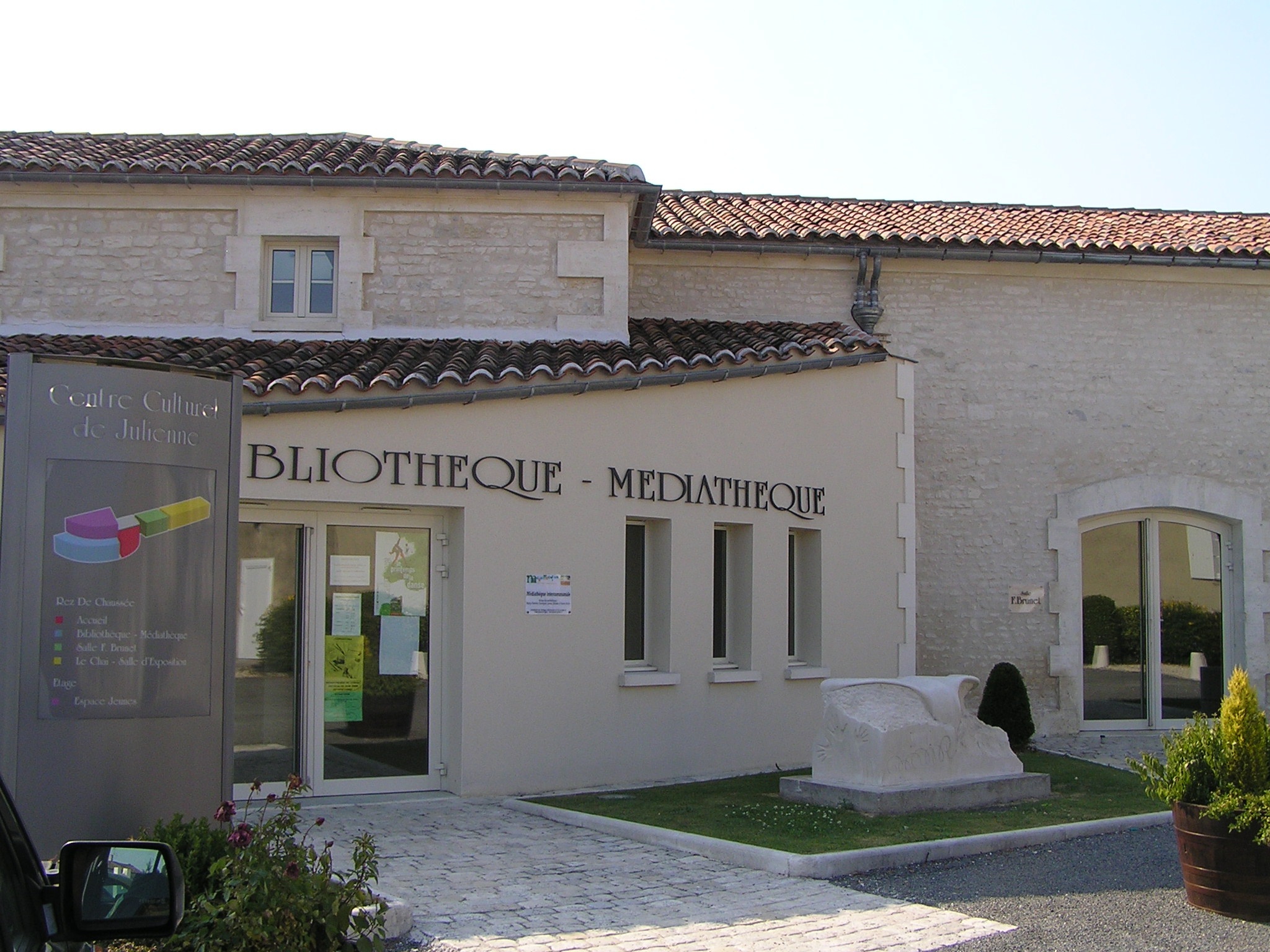 bibliothèque de Julienne